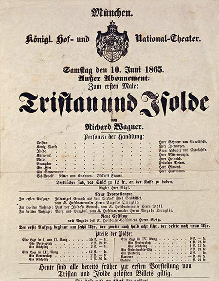 Tristan und Isold